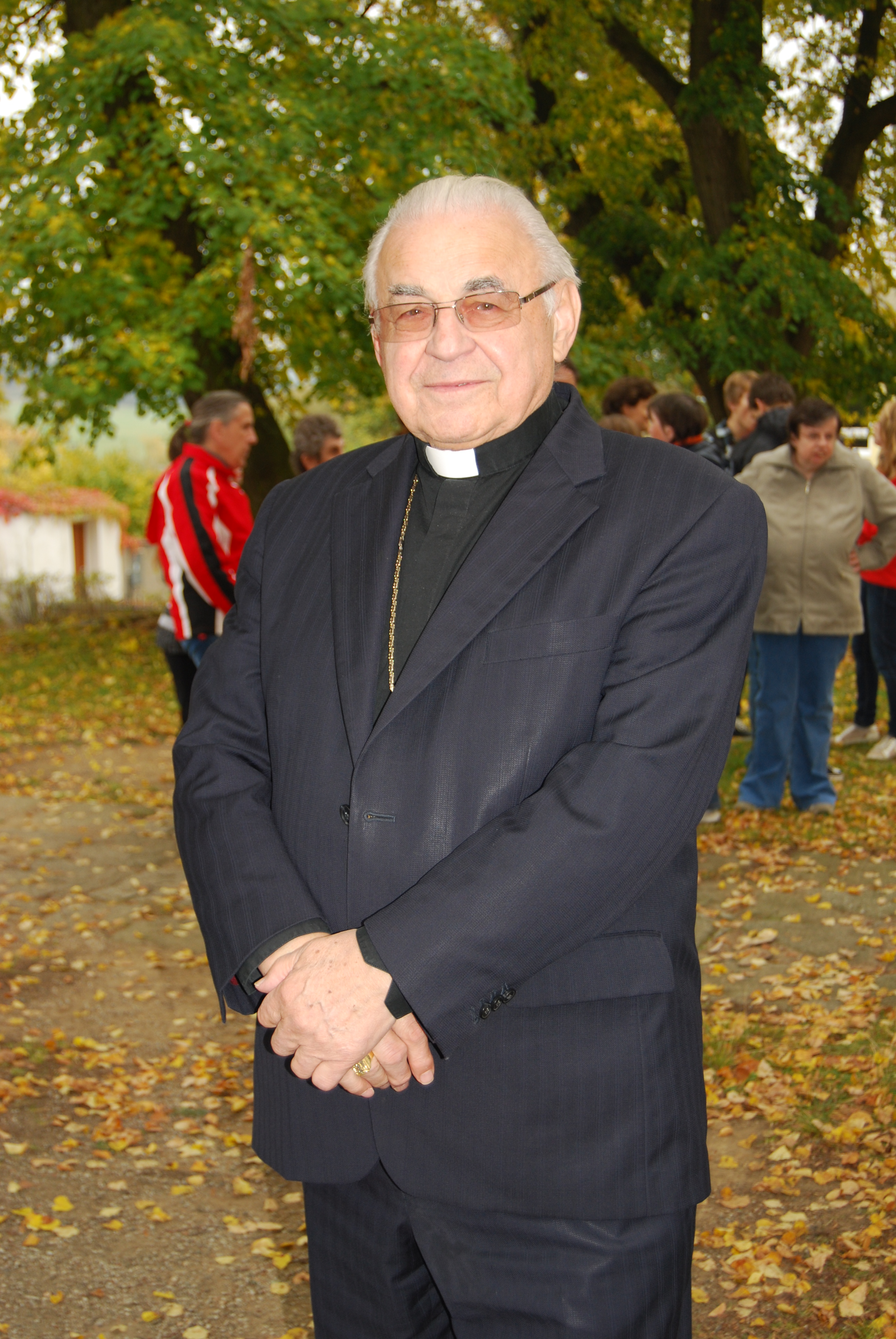 PhDr. Miloslav kardinál Vlk na Vikariátním setkání mládeže v Krásné Hoře nad Vltavou. Krásná Hora nad Vltavou. Okres Příbram. Česká republika.